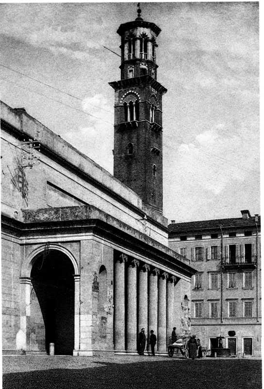 Esterno del Teatro Nuovo a Verona, in una fotografia d'epoca